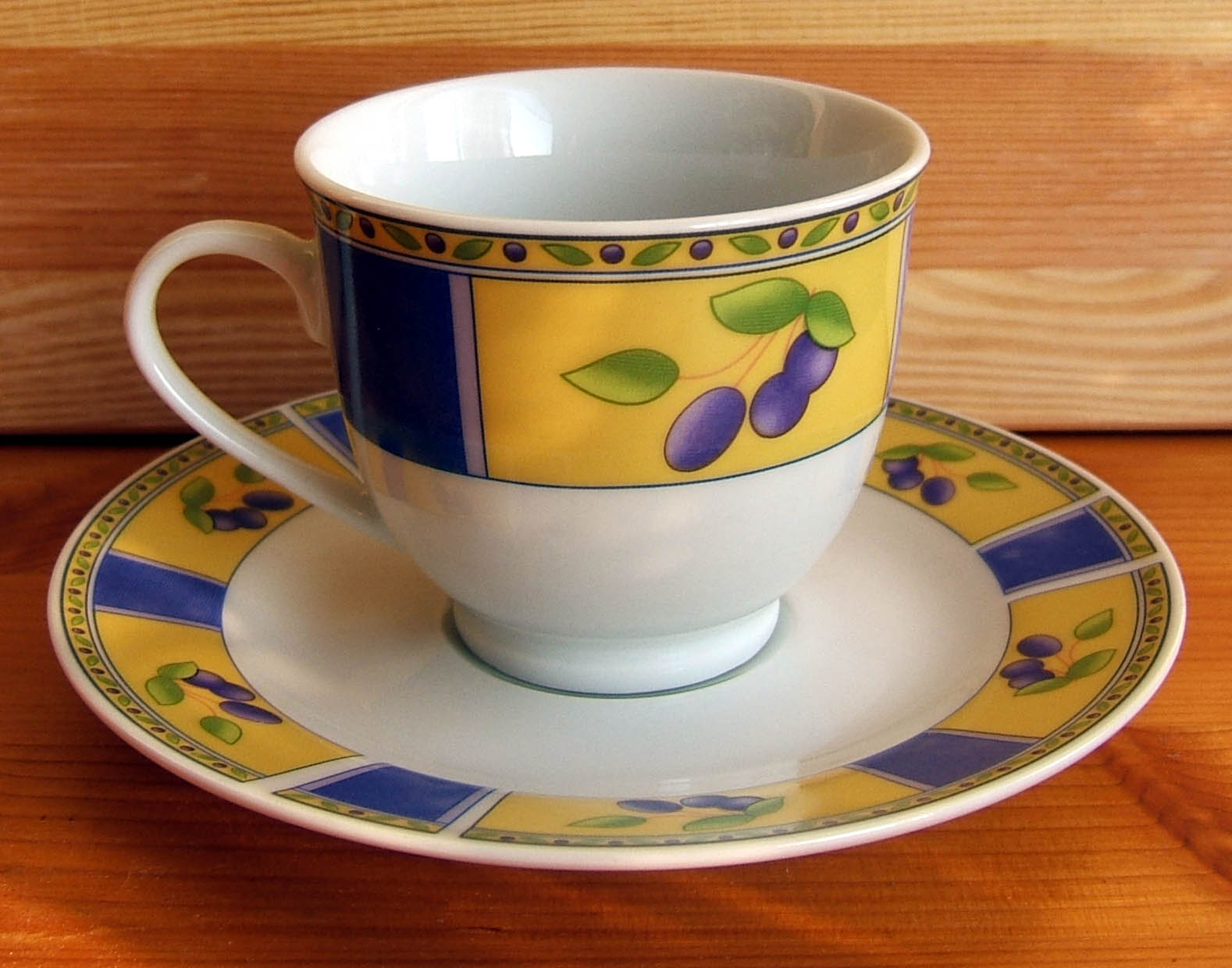 porcelain cup